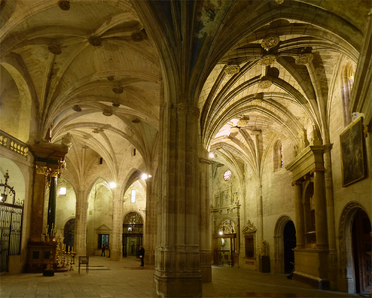 Catedral de Santa María y San Julián, Cuenca, Castilla-La Mancha, España.